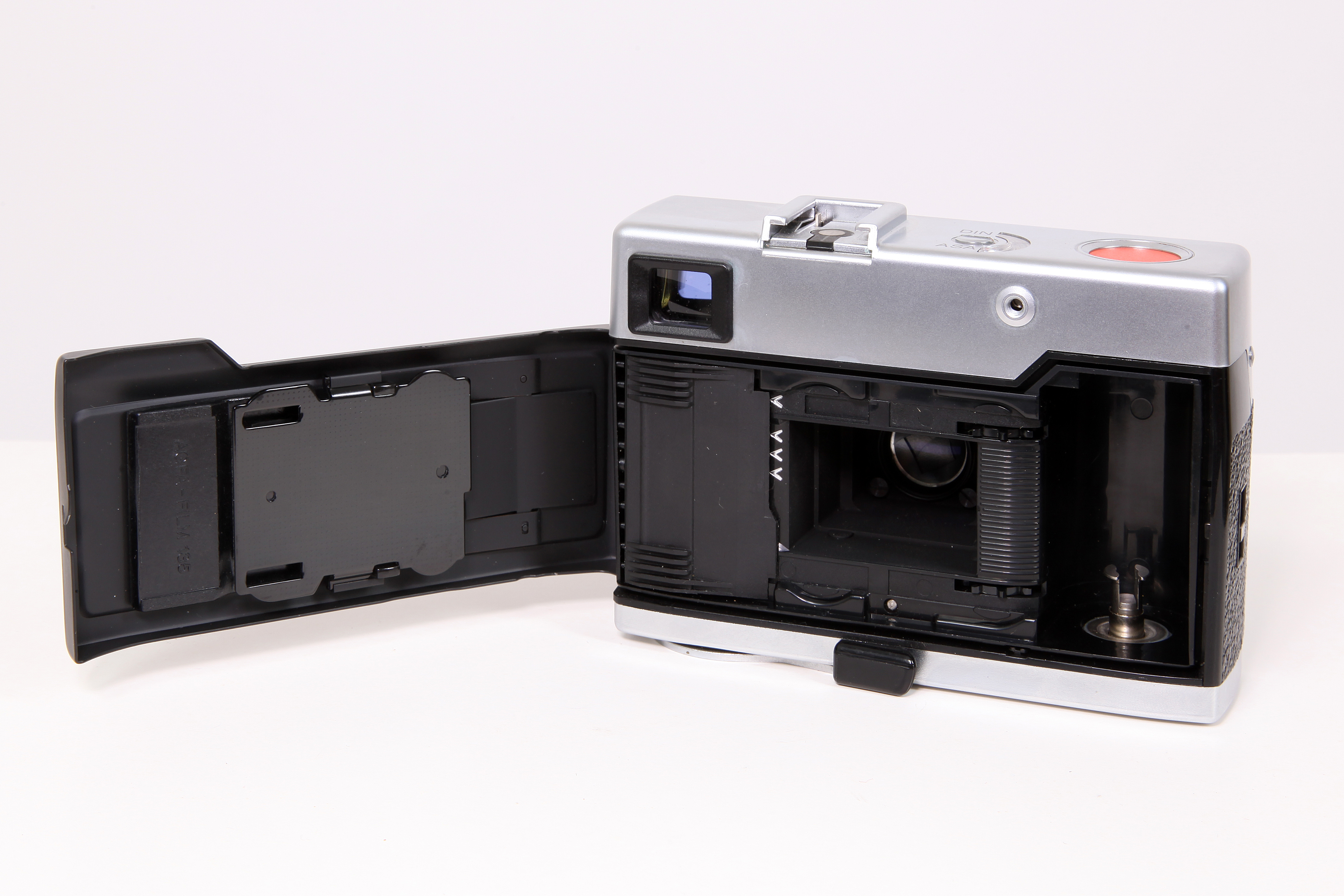 Fotoapparat Agfa Optima 200, geöffnet